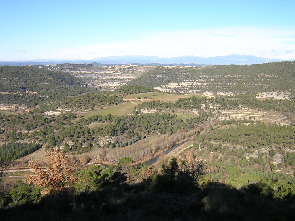 La vall de Calders, a Monistrol de Calders (Moianès)